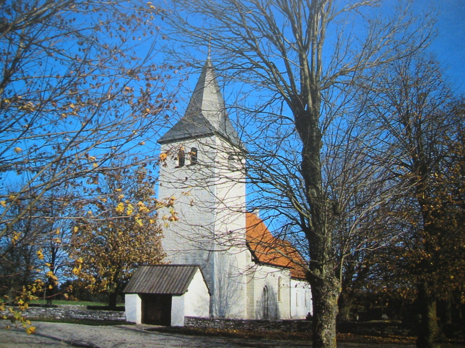 Viklau kyrka med stigluckan.